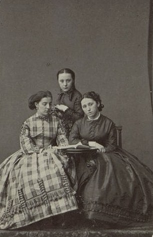 Елизавета Андреевна Шувалова (1845—1924) и её двоюродные сестры — Ольга Петровна (1848—1927) и Варвара Петровна Шуваловы (1850—1872).